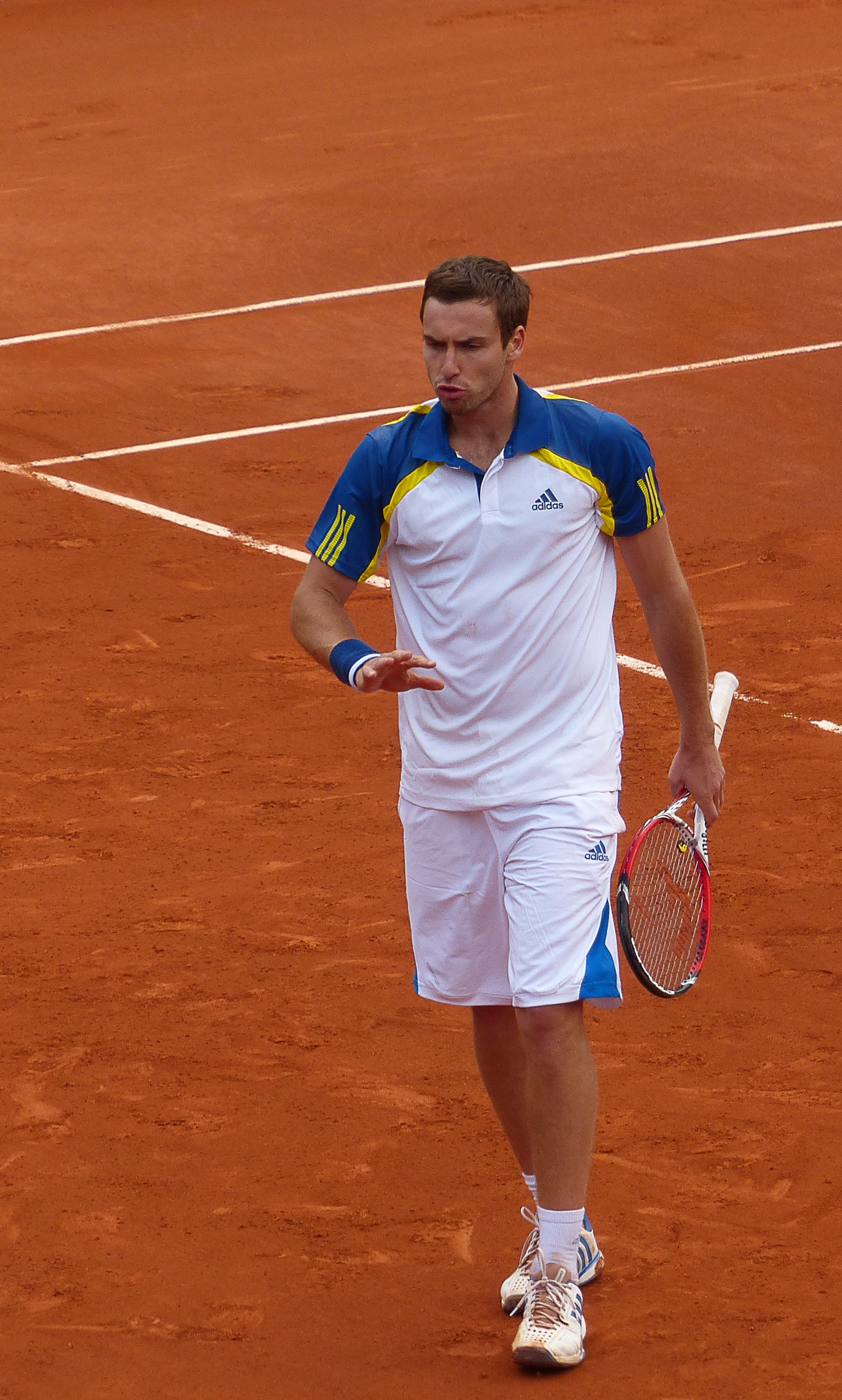 2ème tour Roland Garros 2013 : Gael Monfils (FRA) def. Ernests Gulbis (LAT)